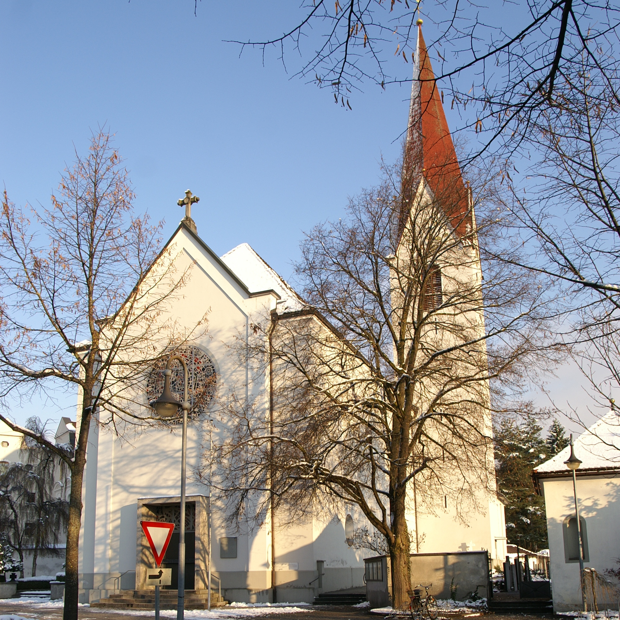 Pfarrkirche hll. Pankratius und Zeno im Ortsteil Altenstadt in Feldkirch, Vorarlberg. Sie ist baulich an die Dominikanerinnenkirche und Kloster nördlich verbunden.